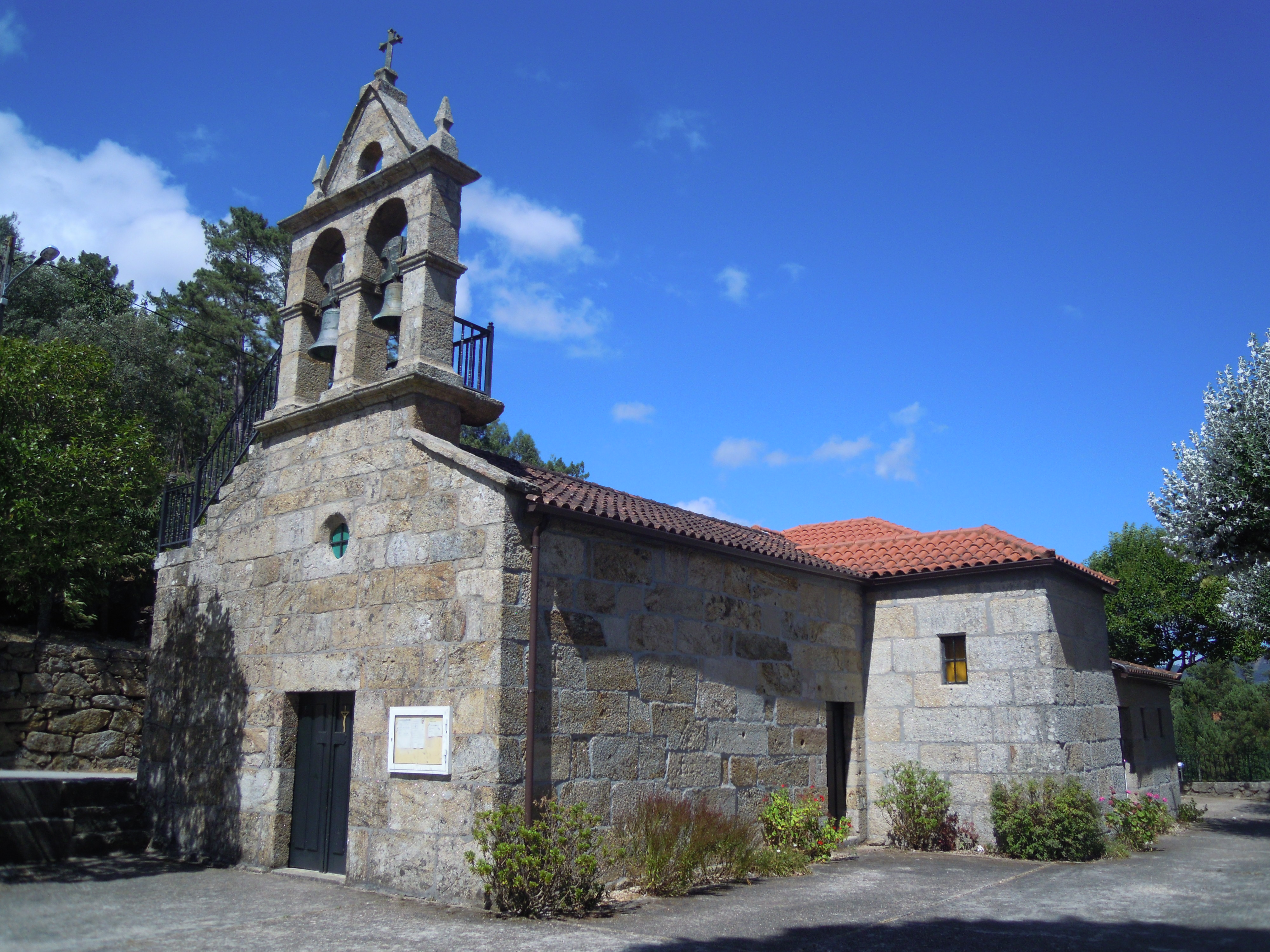 Igrexa de Santa María de Ribeira (Crecente)